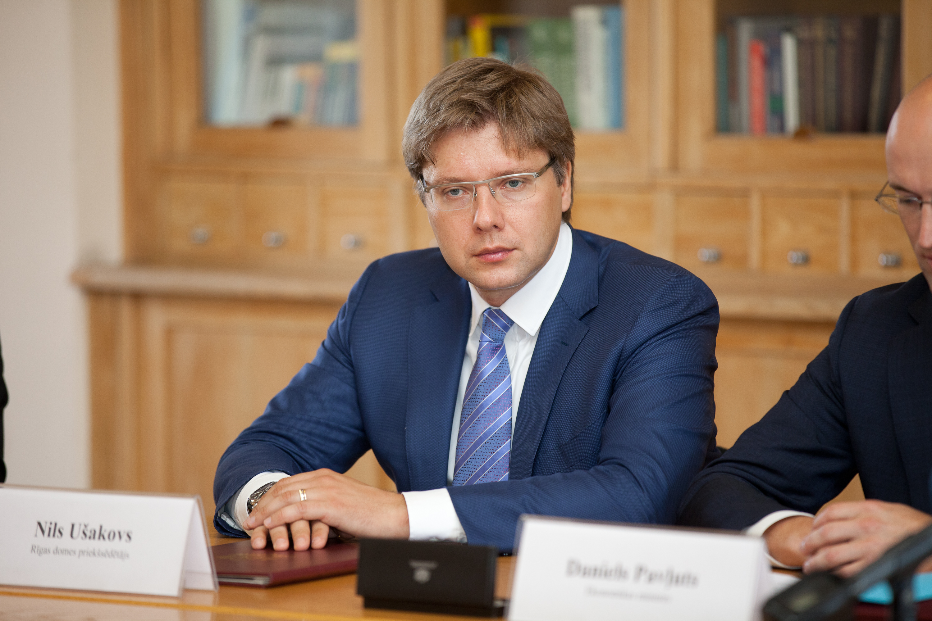 Attēlā: Rīgas domes priekšsēdētājs Nils Ušakovs Foto: Toms Norde, Valsts kanceleja